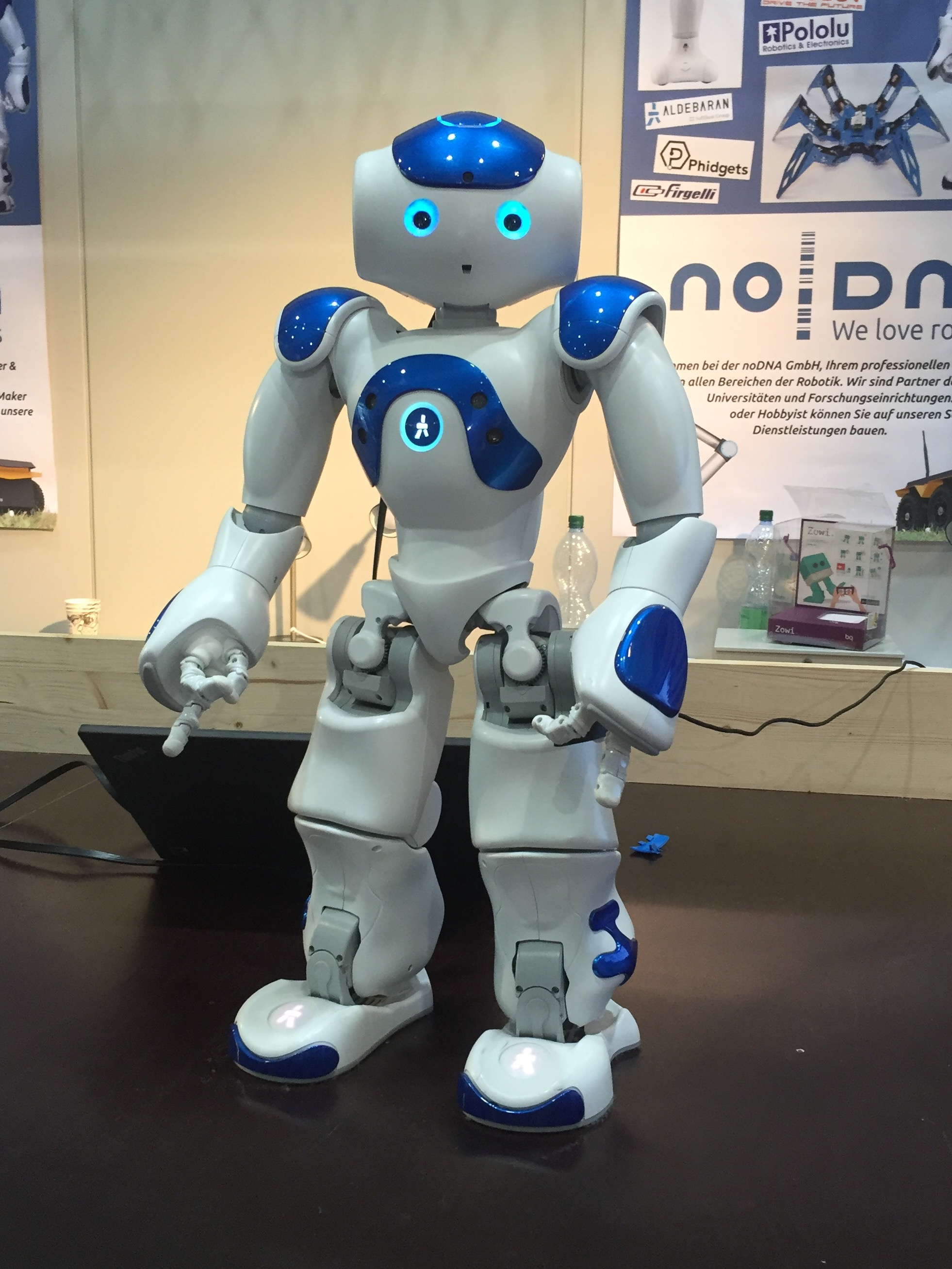 Nao Robot (Robocup 2016)